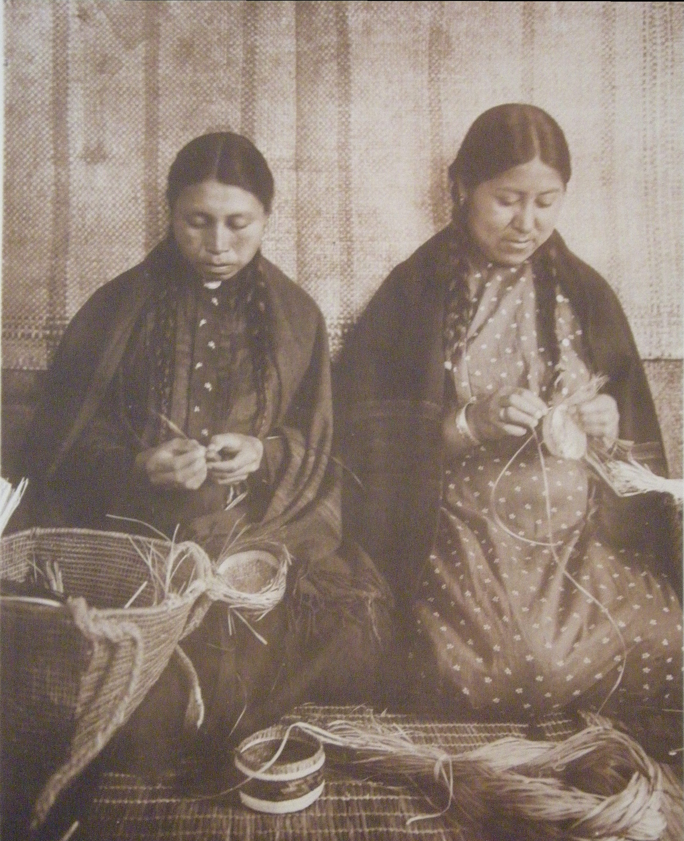 "Makah Indian Basket-Weavers".